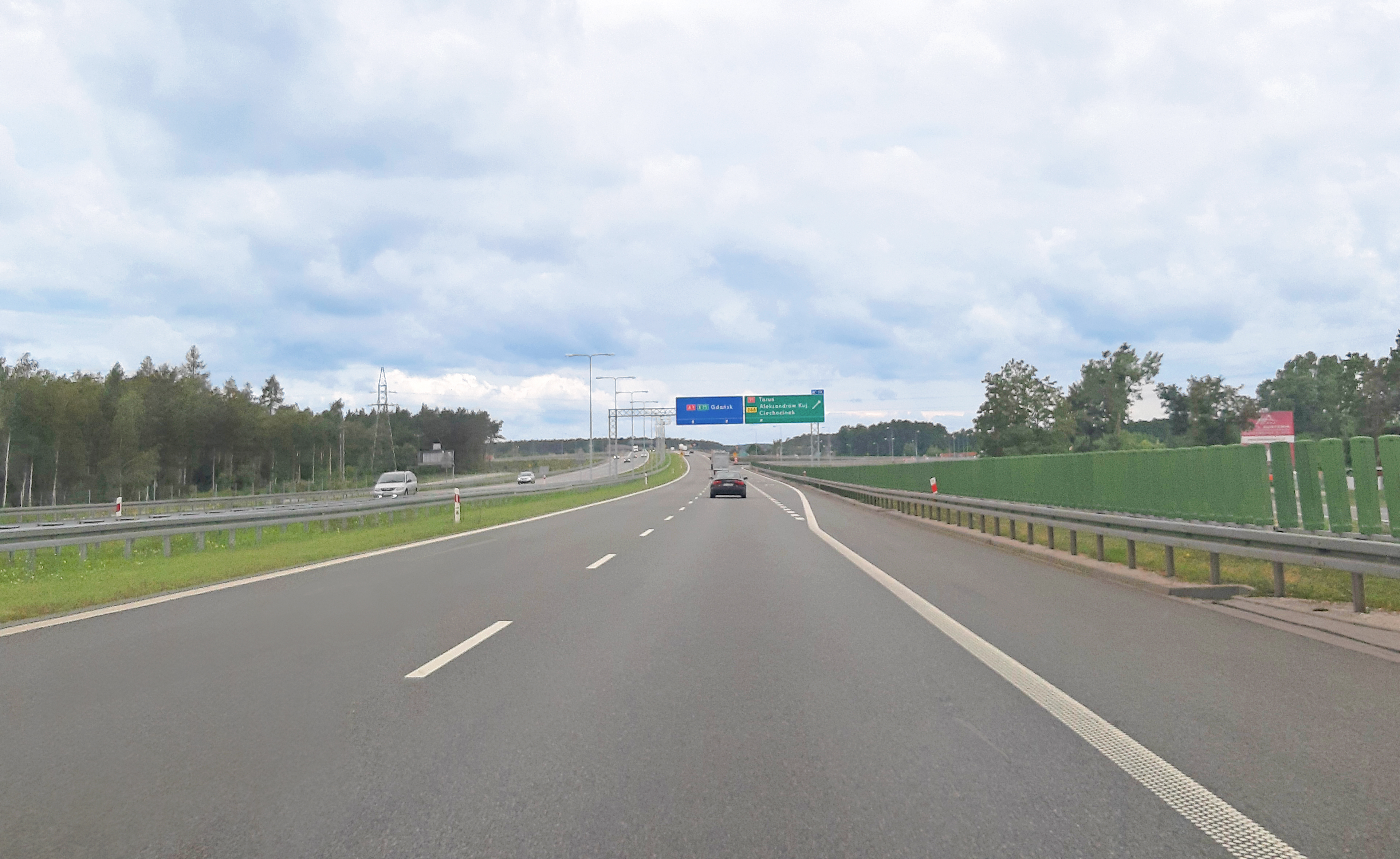 Autostrada A1, Włocławek